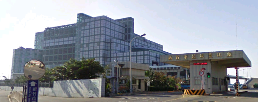 新竹市垃圾焚化廠。